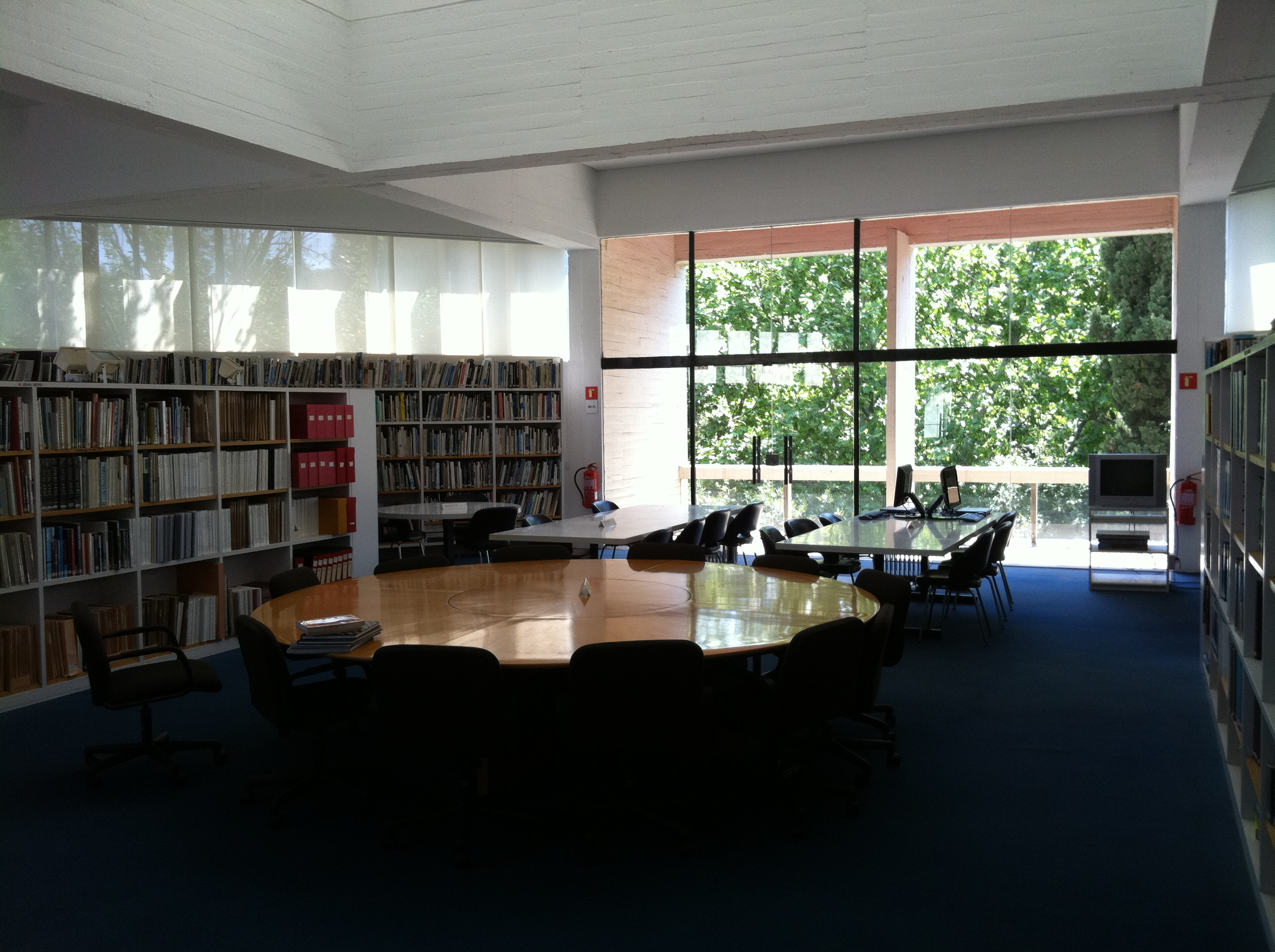 Biblioteca de la Fundació Joan Miró de Barcelona